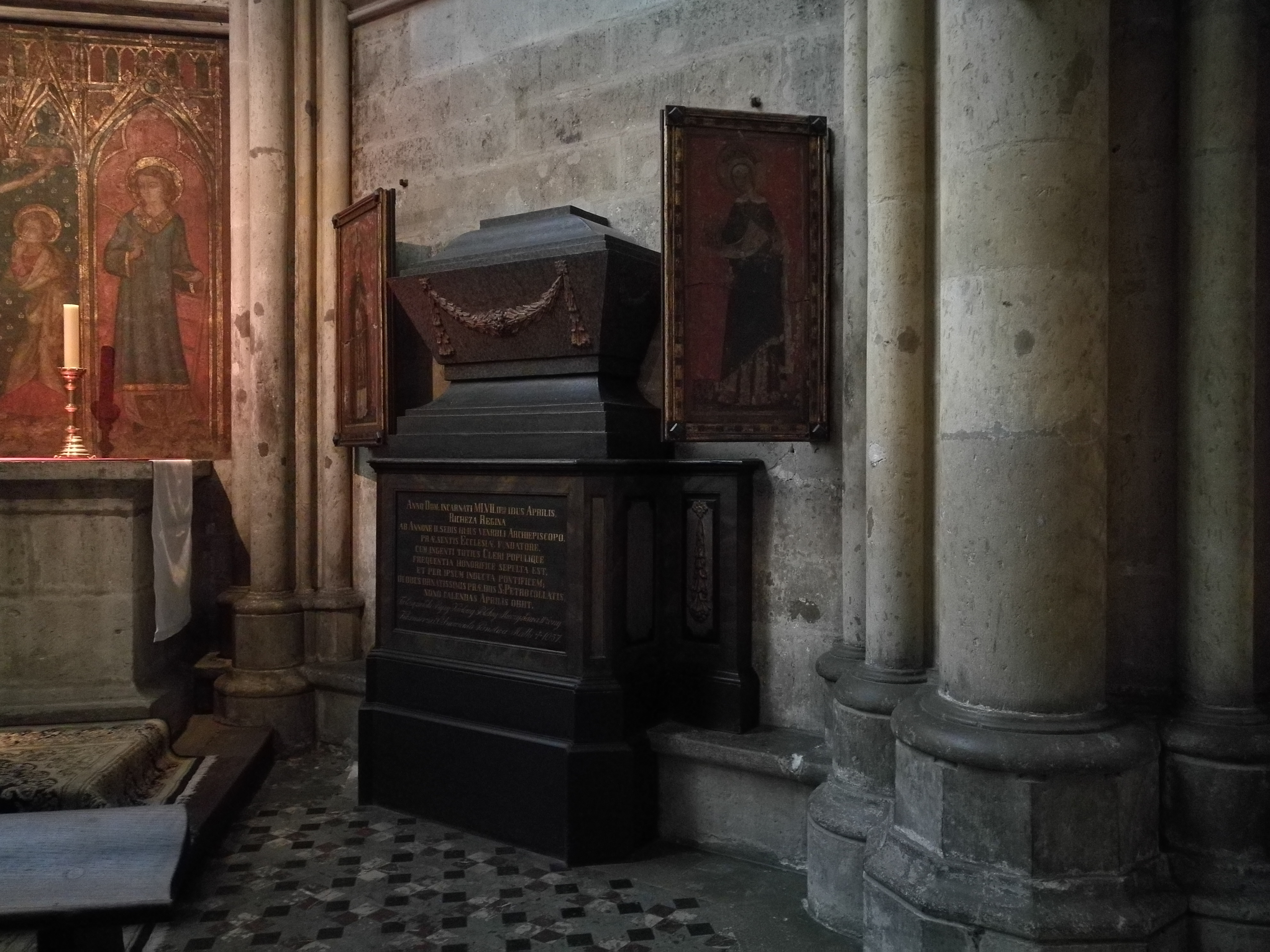 relikwiarz Rychezy Lotaryńskiej w kaplicy św. Jana w katedrze kolońskiej